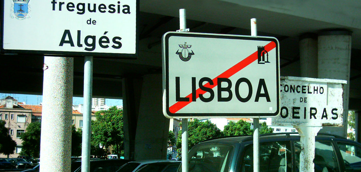 Fonteira municipal em Algés (Lisboa-Belém/Oeiras-Algés)